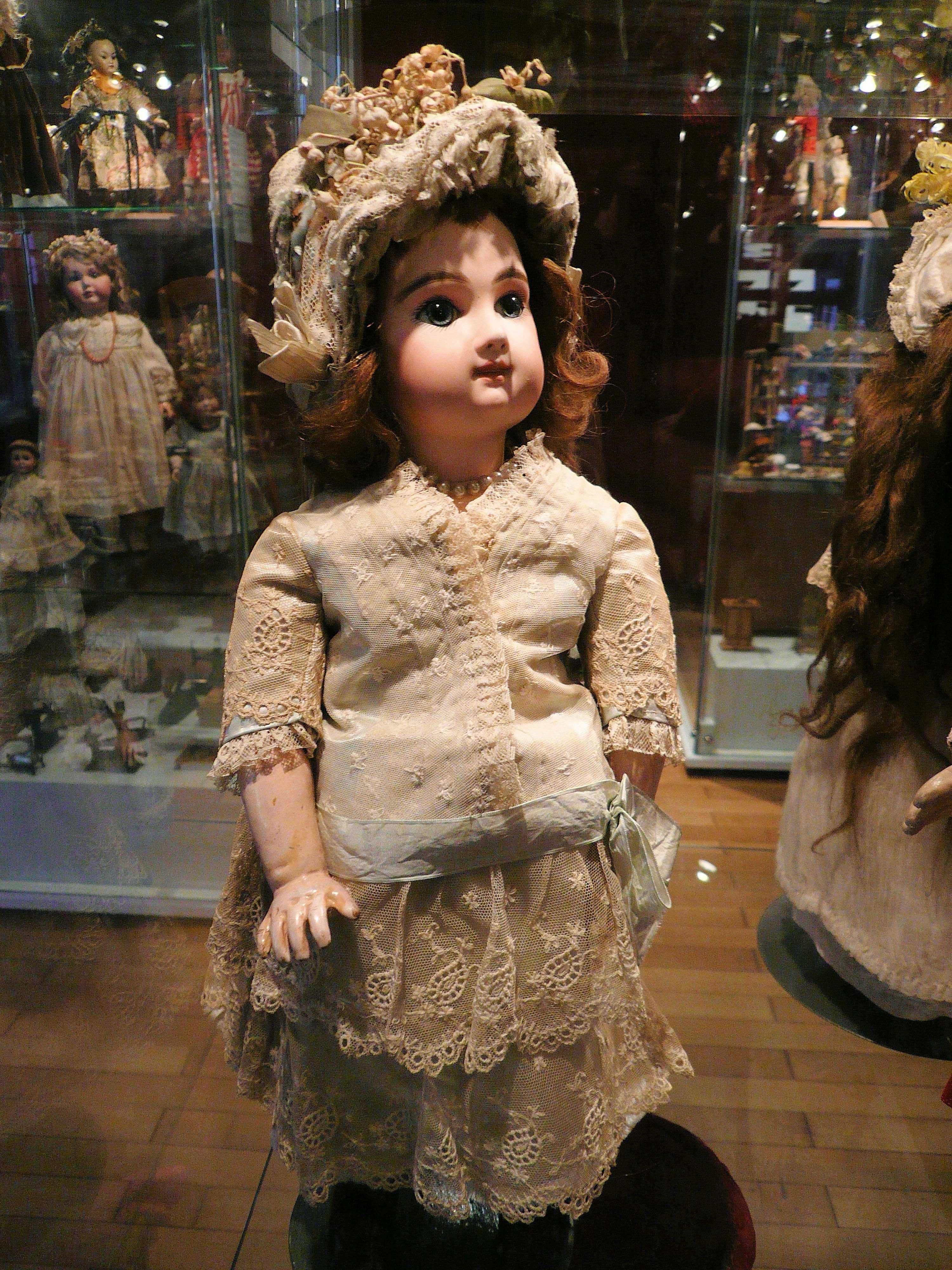 Puppenabteilung des Grafschaftsmuseums